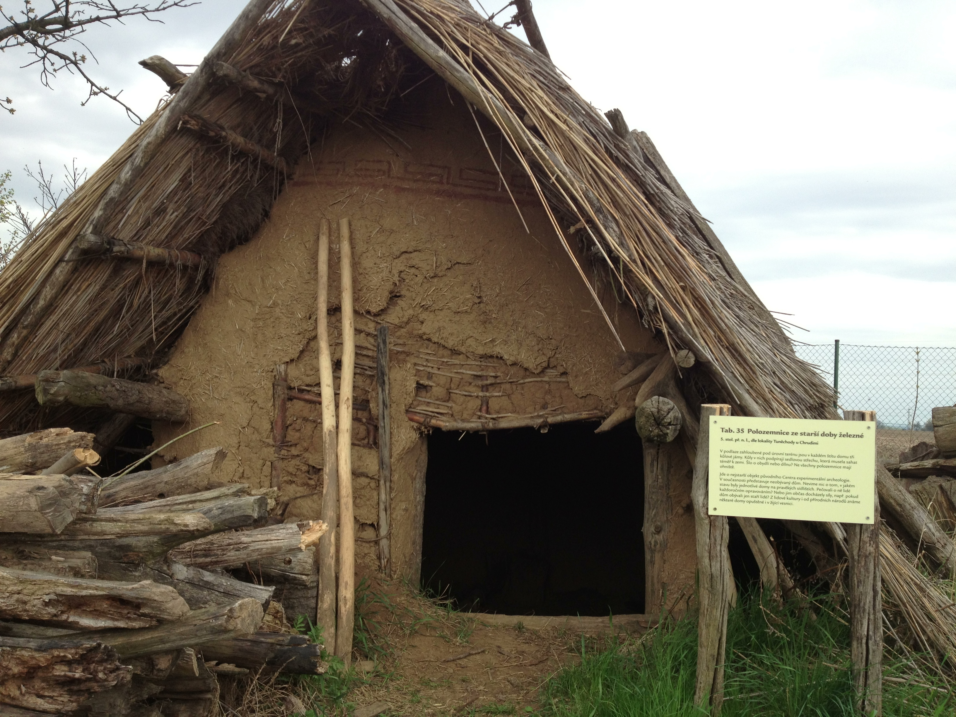 Polozemnice z CEA